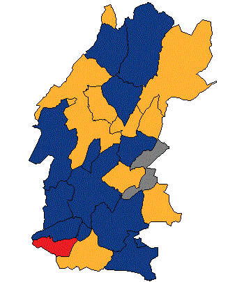 !Template:Llegenda}